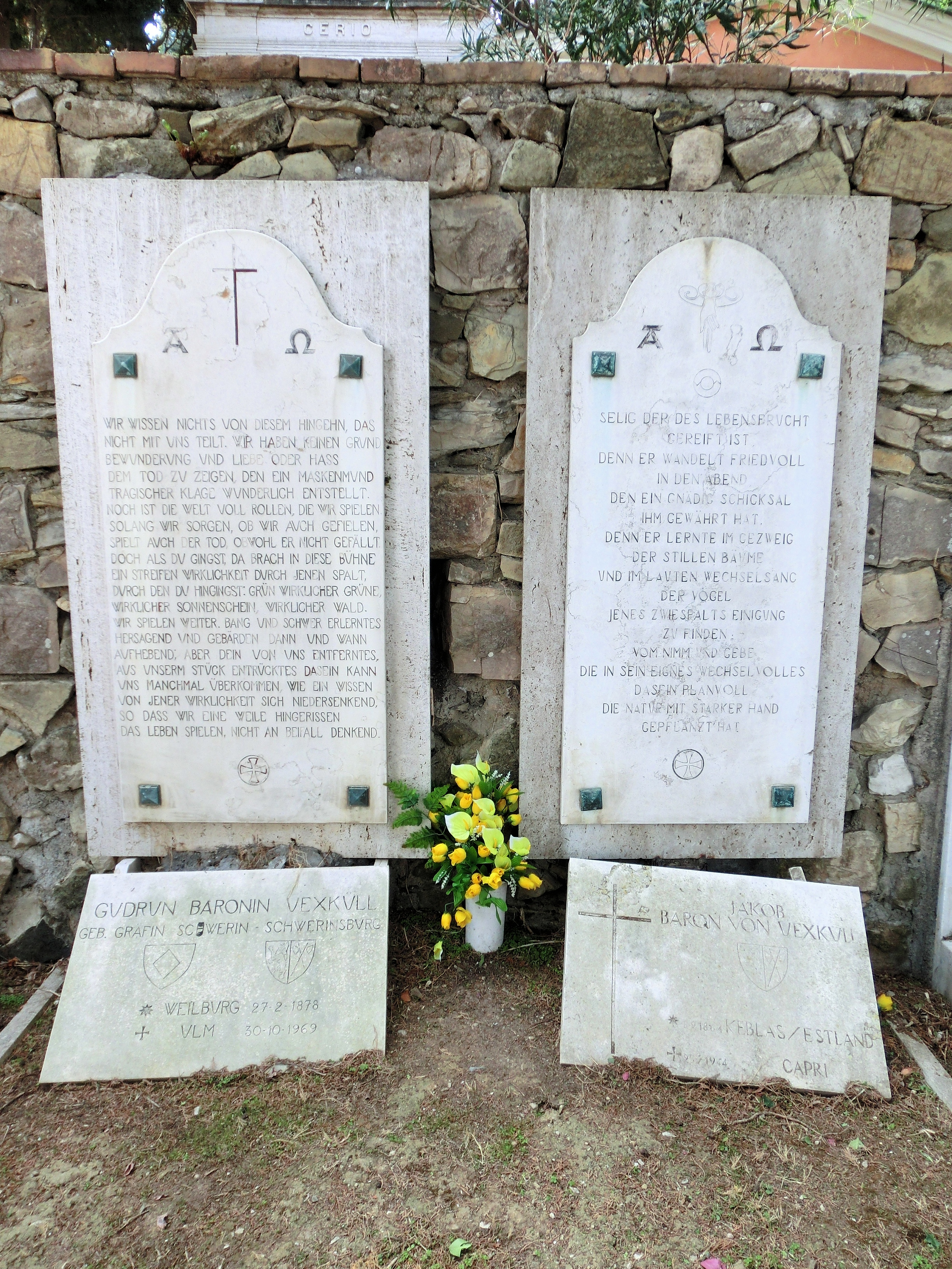 Cemeterio Acattolico Capri, Grave Jakob Johann von Uexküll (1864-1944)